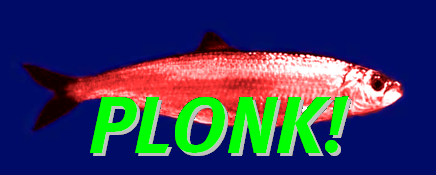 Roter Hering mit der Aufschrift PLONK!